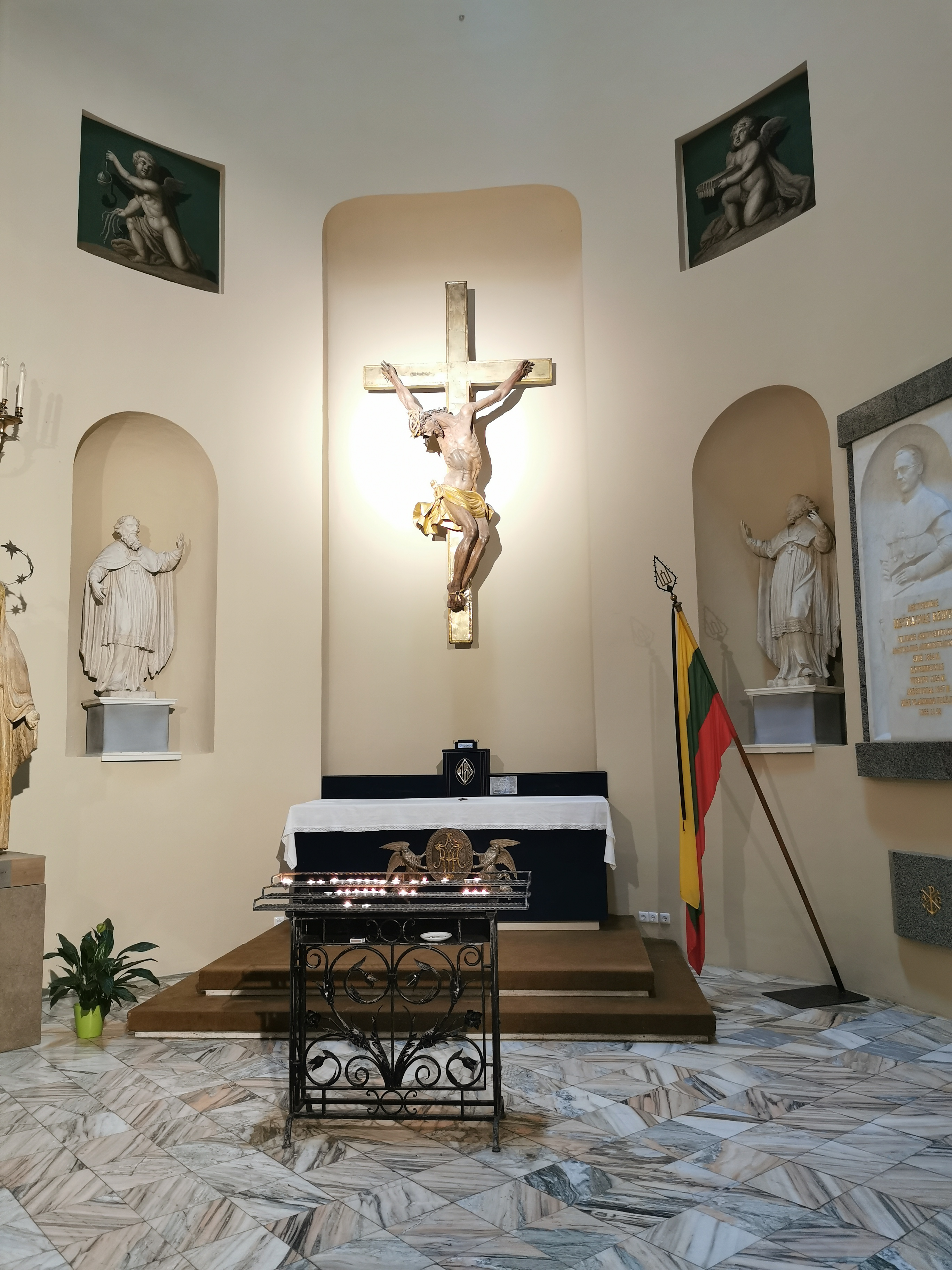 Tremtinių koplyčia